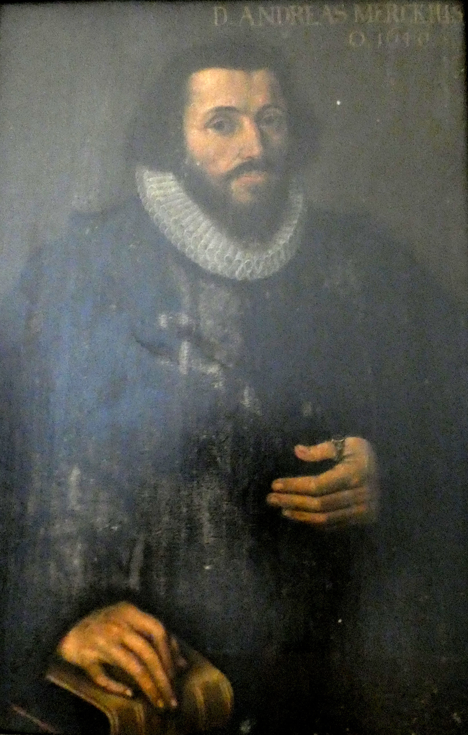 Fotografische Reproduktion (bearb.) eines Porträtgemäldes des Oberpfarrers der Marktkirche Halle Andreas Merck